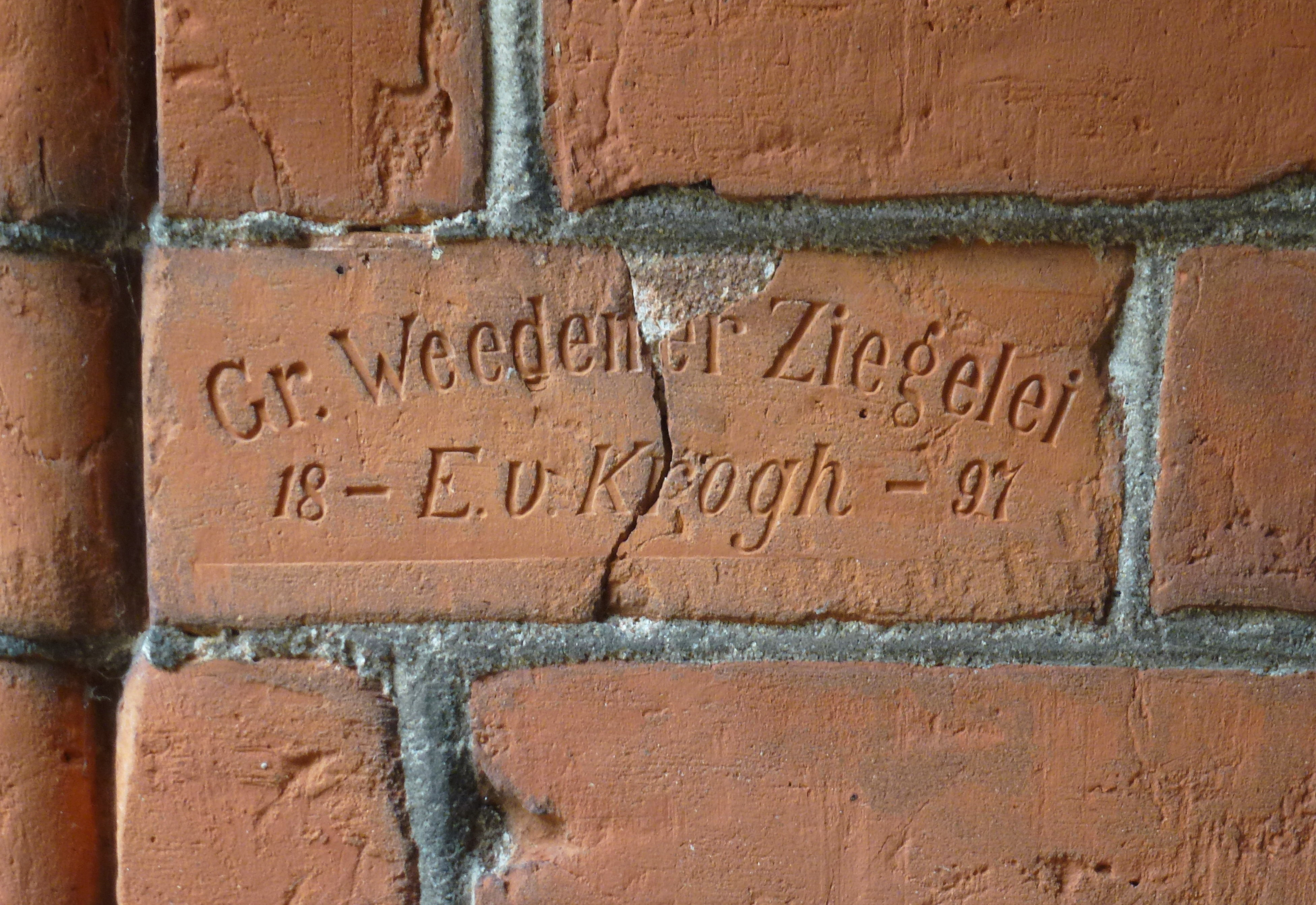 Basilika Altenkrempe, Westportal, Ziegelprägung